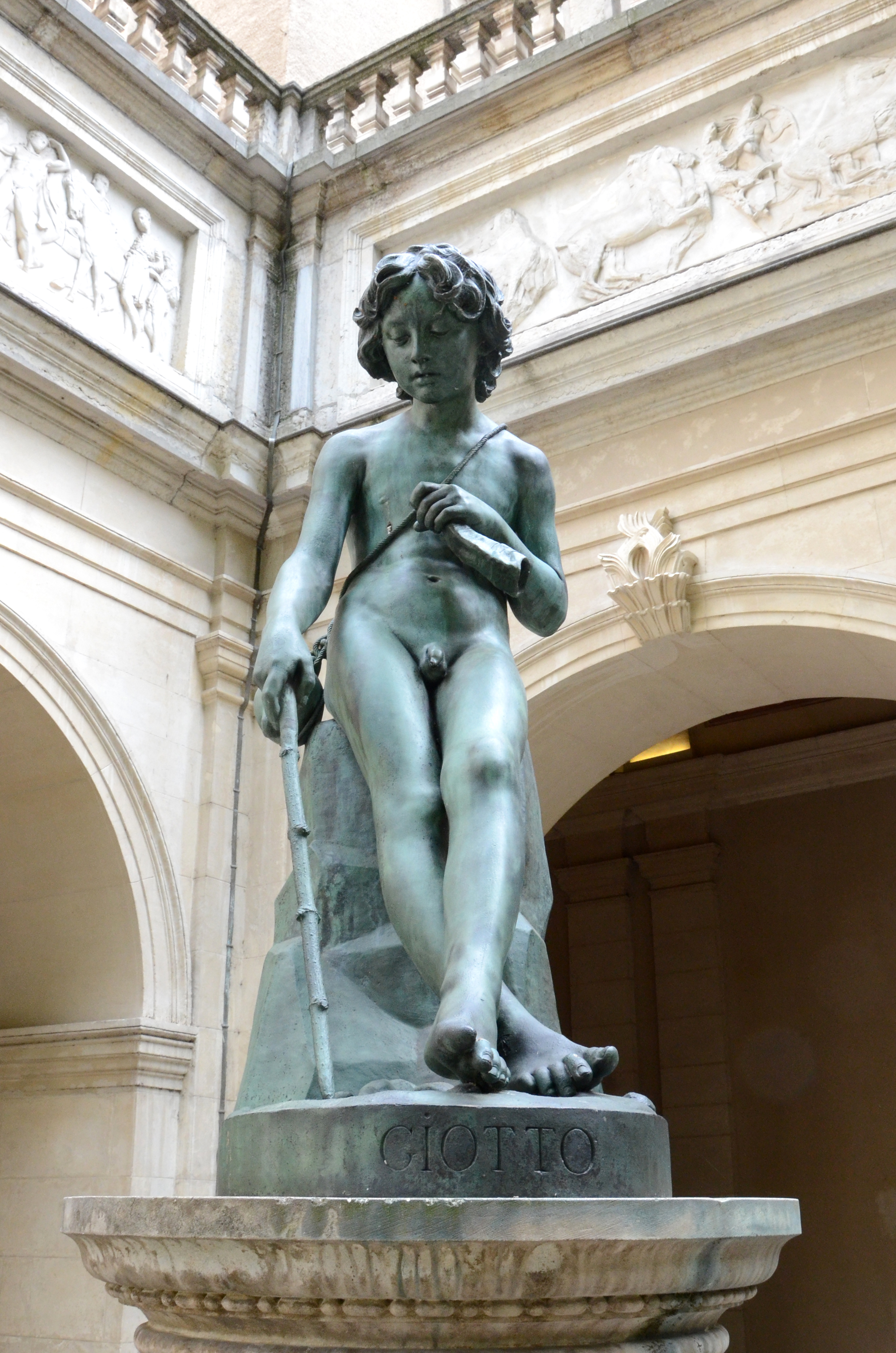 Giotto enfant dessinant une tête de bélier (1842), Jean-François Legendre-Héral (Montepellier 1795-Mars 1851), signé daté, fondu par Soyer Cette œuvre s’inscrit dans le cadre d’un renouveau d’intérêt pour la légende de Cimabue et son élève Giotto, formé à Florence, relatée par Vasari dans les « Vies des meilleurs peintres, sculpteurs et architectes », premier recueil d’histoire de l’art publié en 1550 à Florence : alors que Giotto enfant gardait les chèvres de son père, « il passait son temps à dessiner sur les pierres, sur la terre ou le sable, ce qu’il avait sous les yeux ou ce que lui inspirait son imagination. Un jour Cimabue qui se rendait pour affaires de Florence à Vespignano trouve Giotto qui faisait paître les moutons et dessinait une brebis d’après nature sur une pierre plate. Cimabue s’arrêta émerveillé et lui demanda s’il voulait venir avec lui. Après accord de son père, Giotto accepta. » Le sculpteur a, pour représenter Giotto, pris pour modèle son fils, Charles